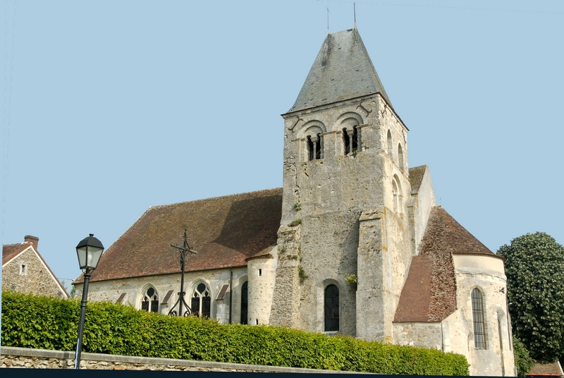 Église de Montlevon.